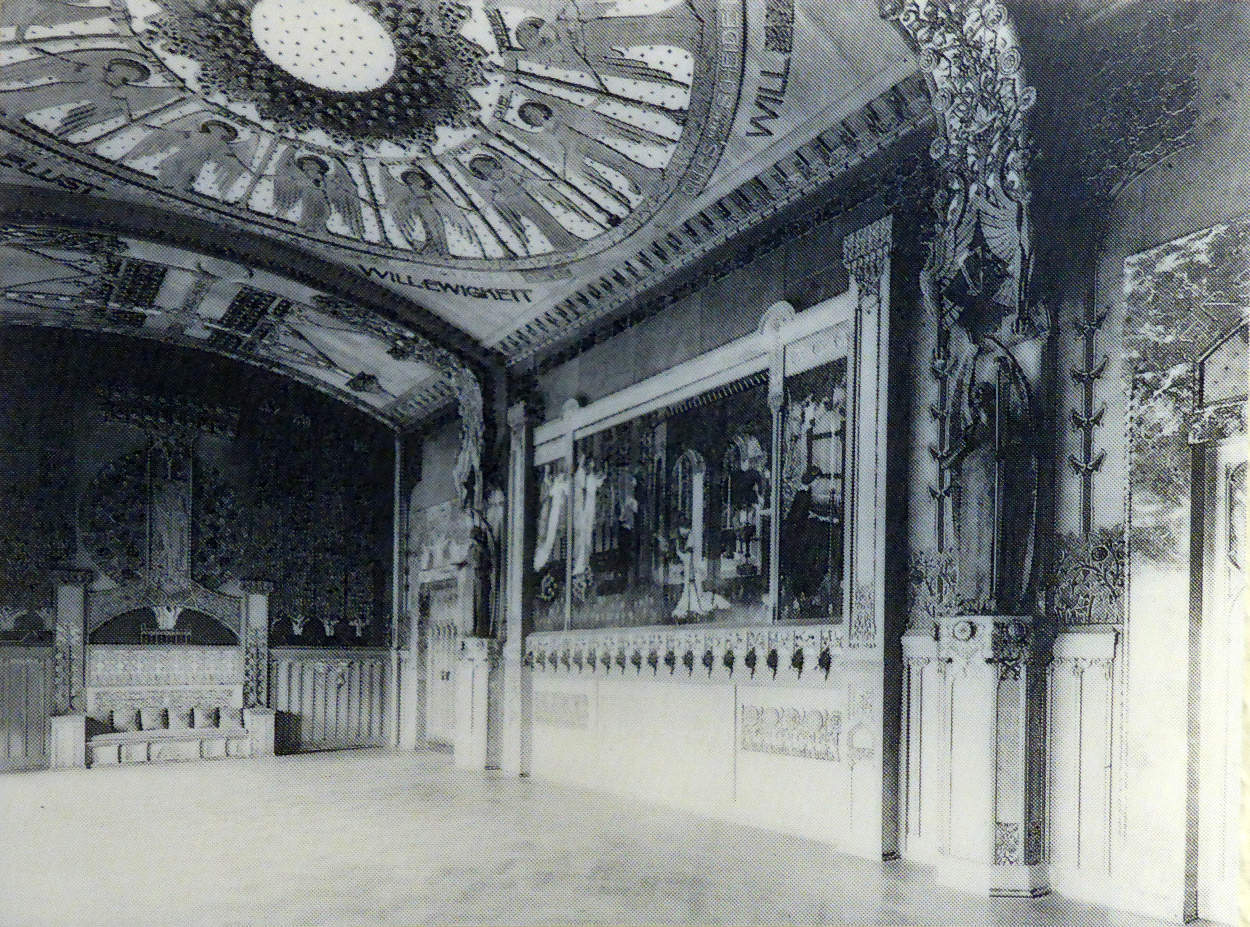 Der "Pallenberg-Saal", gestiftet von Jakob Pallenberg für das Kunstgewerbemuseum Köln. Ausführung Melchior Lechter 1896-1900. Ausgezeichnet mit dem Grand Prix als „räumliches Gesamtkunstwerk des Jugendstils“ auf der Pariser Weltausstellung 1900. Zerstört 1943.